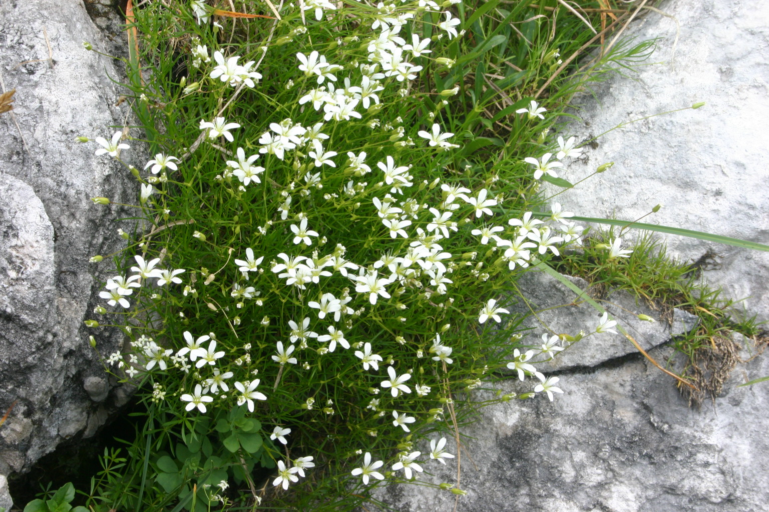 Minuartia austriaca (Österreich-Miere) Aufnahmestandort: Gamsstein bei Hollenstein an der Ybbs, Niederösterreich, Austria